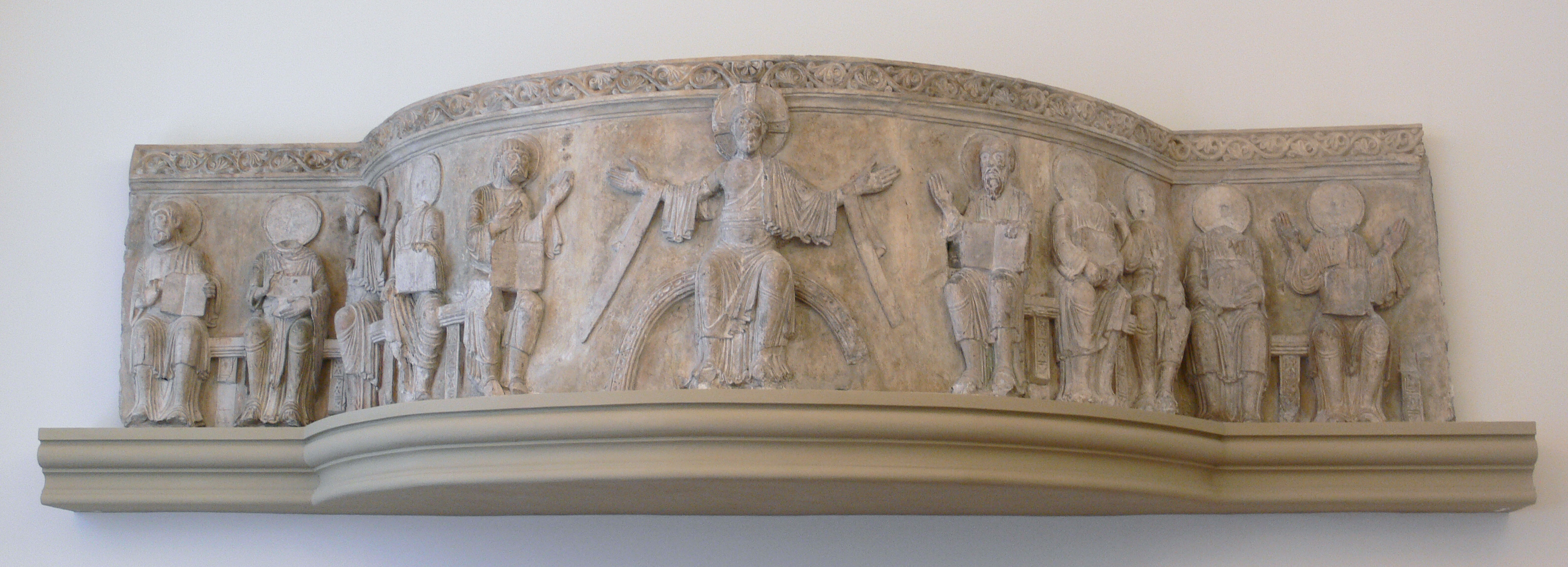 Christus als Weltenrichter, umgeben von Aposteln; Emporenbrüstung aus dem Benediktinerkloster Gröningen, Sachsen-Anhalt; Stuck, geringe Reste von Fassung; Niedersachsen um 1160–1170 Christ Pantocrator, surrounded by apostles; tribune parapet from the benedictine monastery of Gröningen; stucco, remains of paint; Lower Saxony, c. 1160/1170 Bode-Museum Berlin (Skulpturensammlung Inv. 2739), erworben 1902